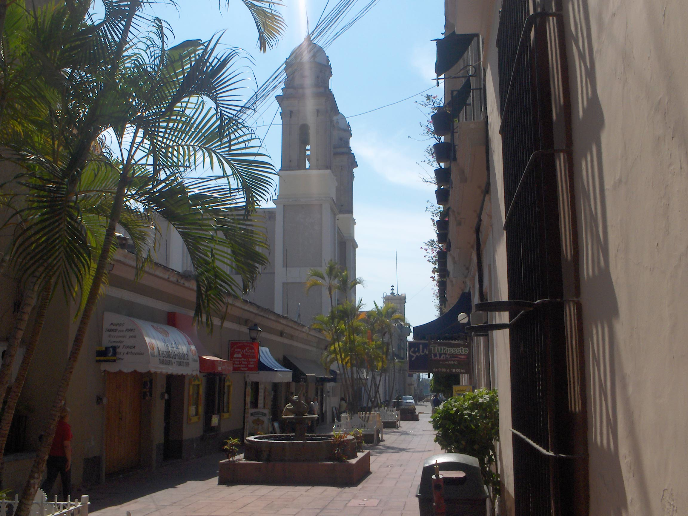 Andador Constitucion Colima Mexico